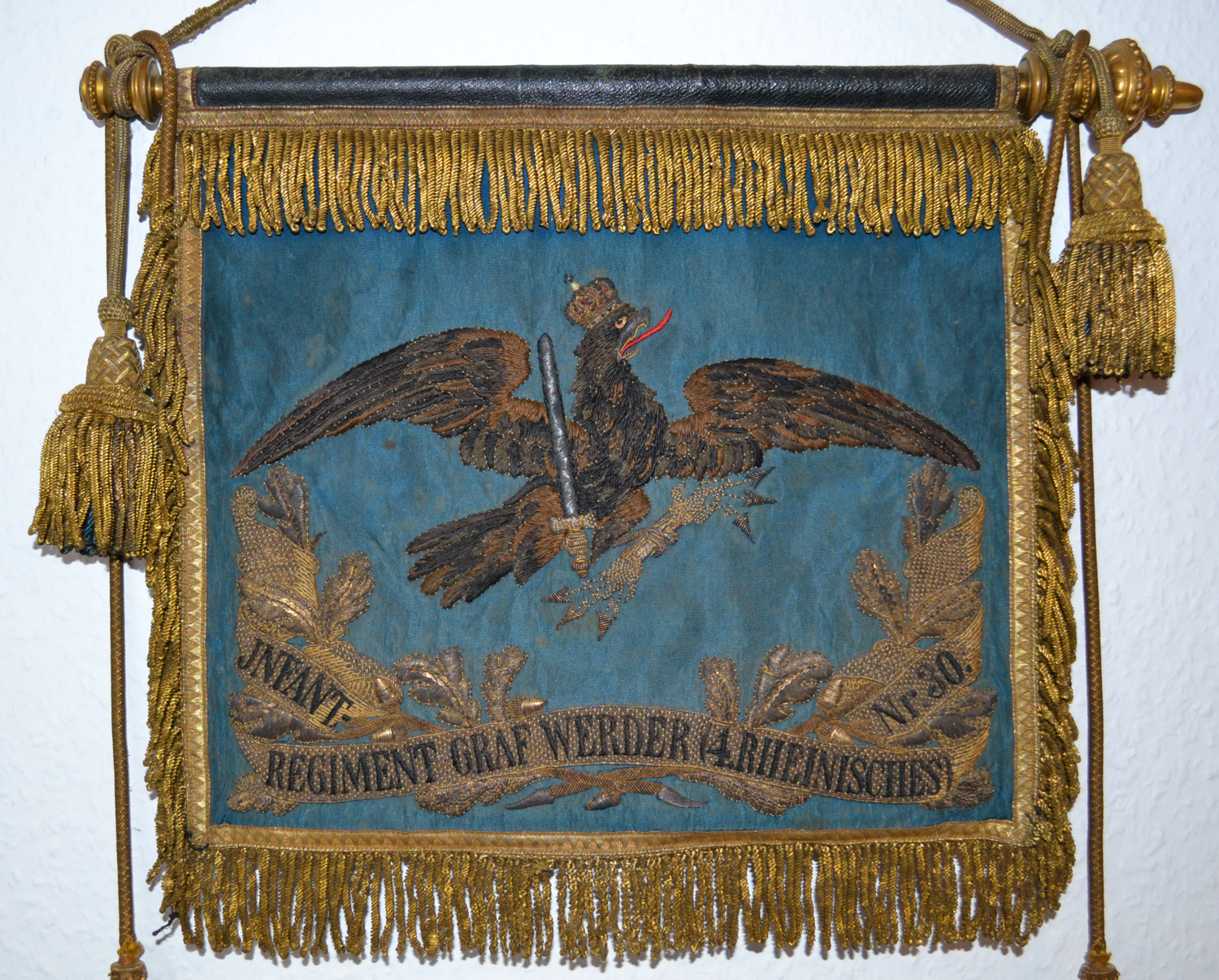 Vorderseite der Schellenbaumfahne des Infanterie-Regimentes Nr. 30 Graf Werder (4. Rheinisches)